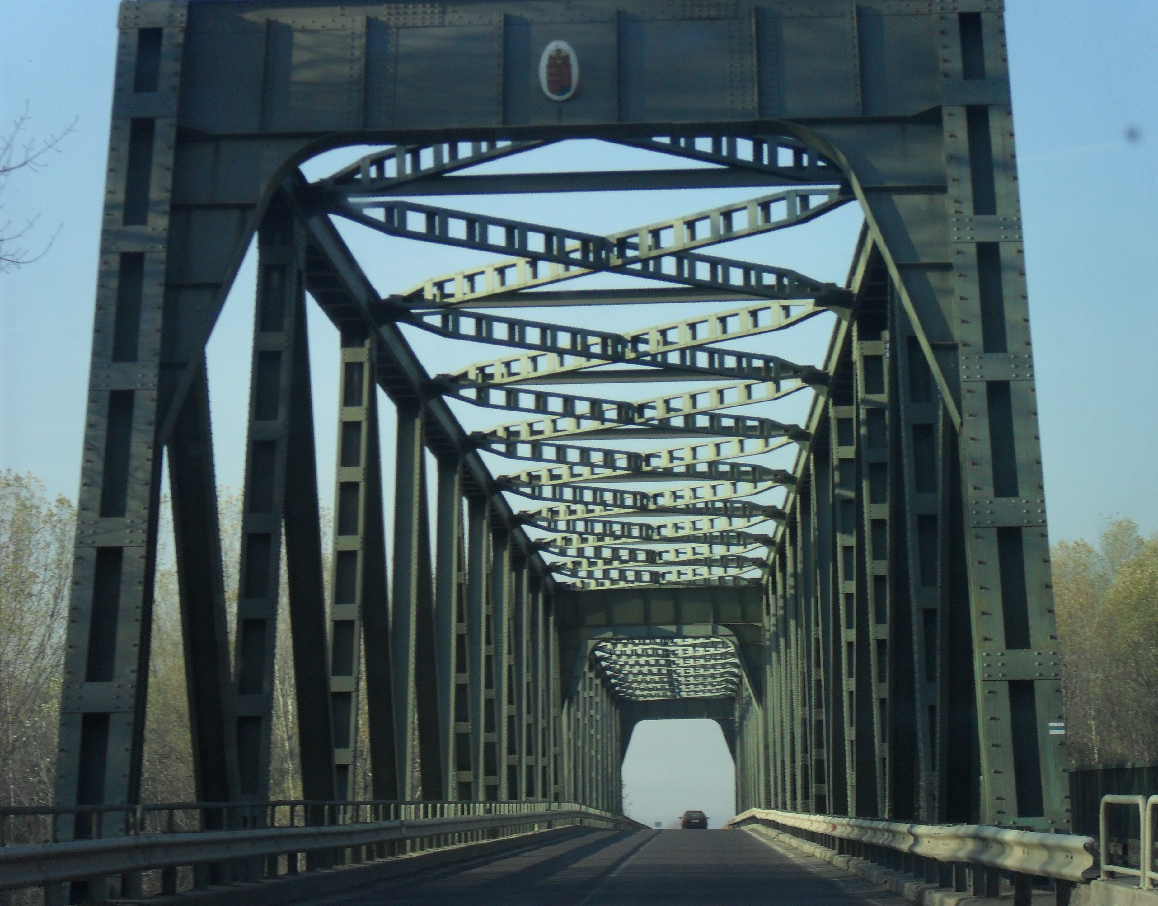 A II. Rákóczi Ferenc Tisza-híd (Kékcséről Cigánd felé haladva) 2012-ben.